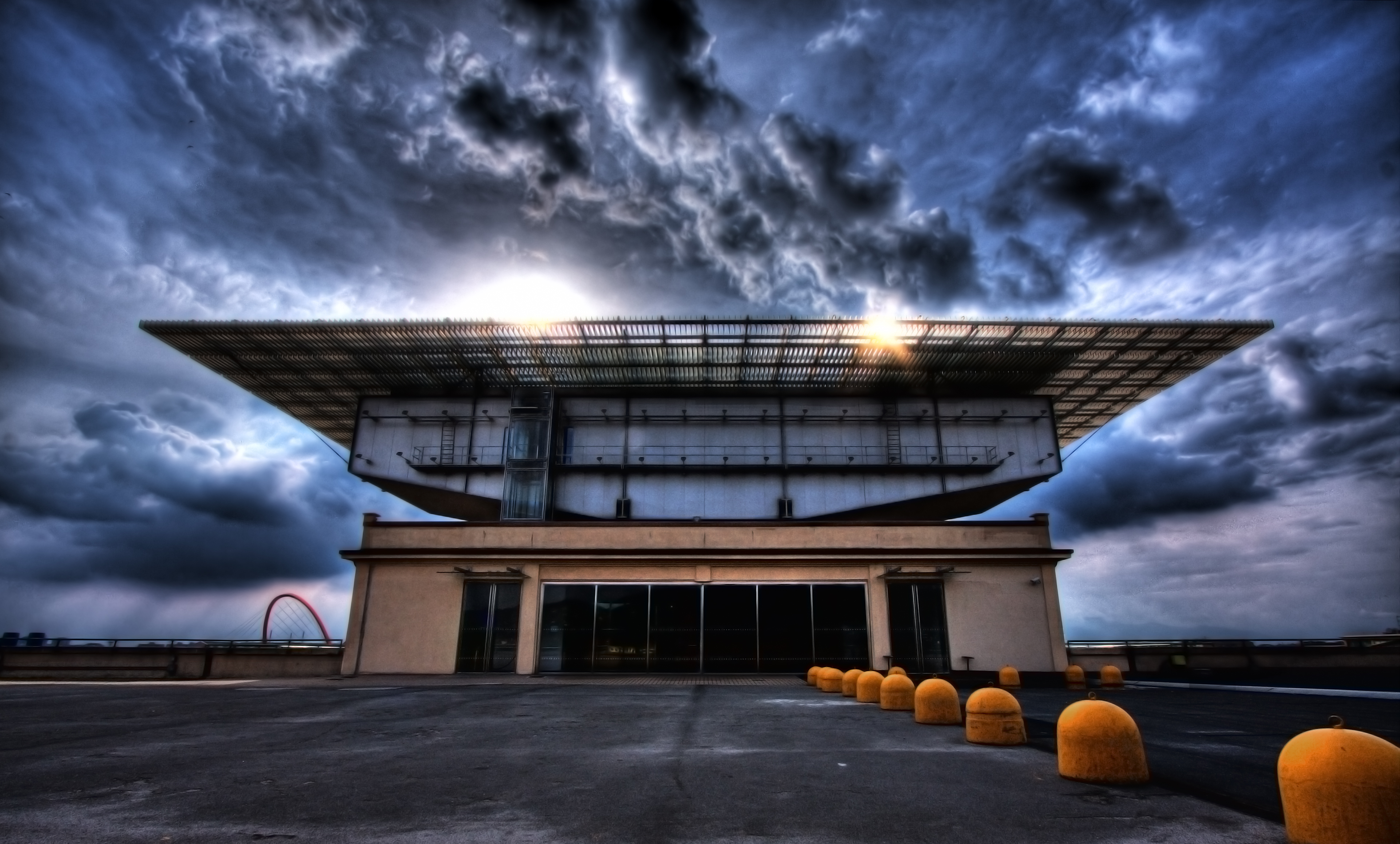 Pinacoteca Giovanni e Marella Agnelli (solo esterni) ID: 0012725707 This is a photo of a monument which is part of cultural heritage of Italy.